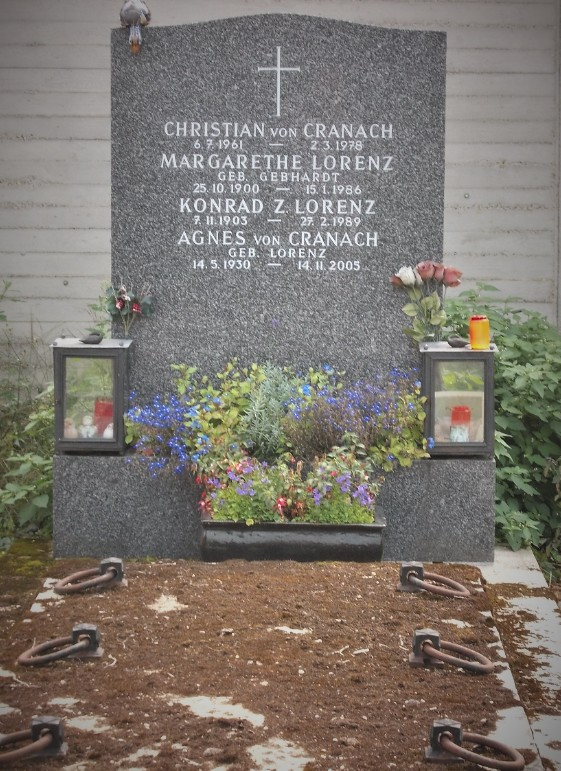 Konrad Lorenz-Friedhof St. Andrä Wördern